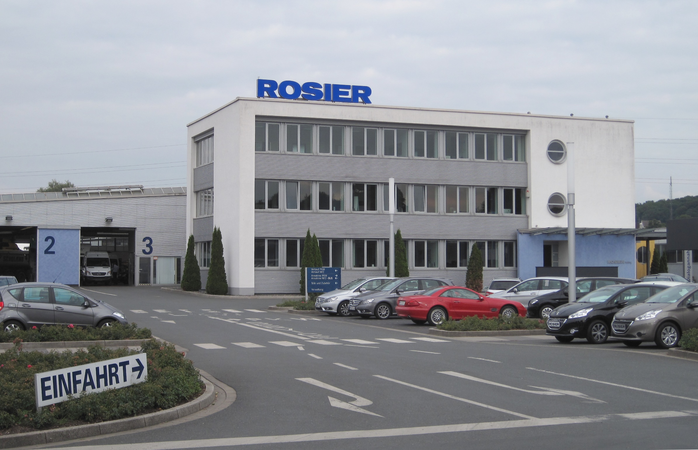 ROSIER (Verwaltungsgebäude) in Menden (Sauerland).